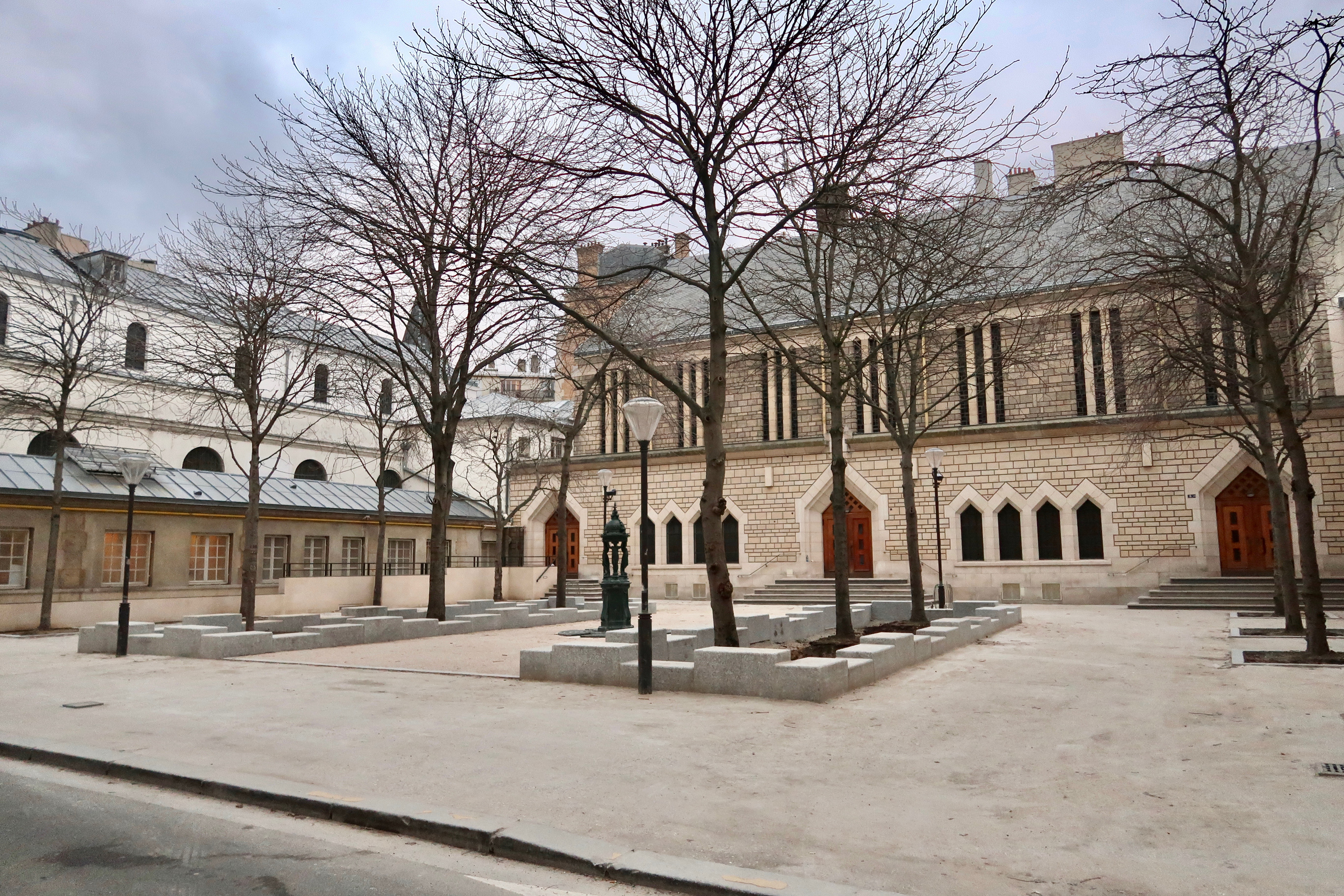 Place du Père-Marcellin-Champagnat (Paris, 16e).